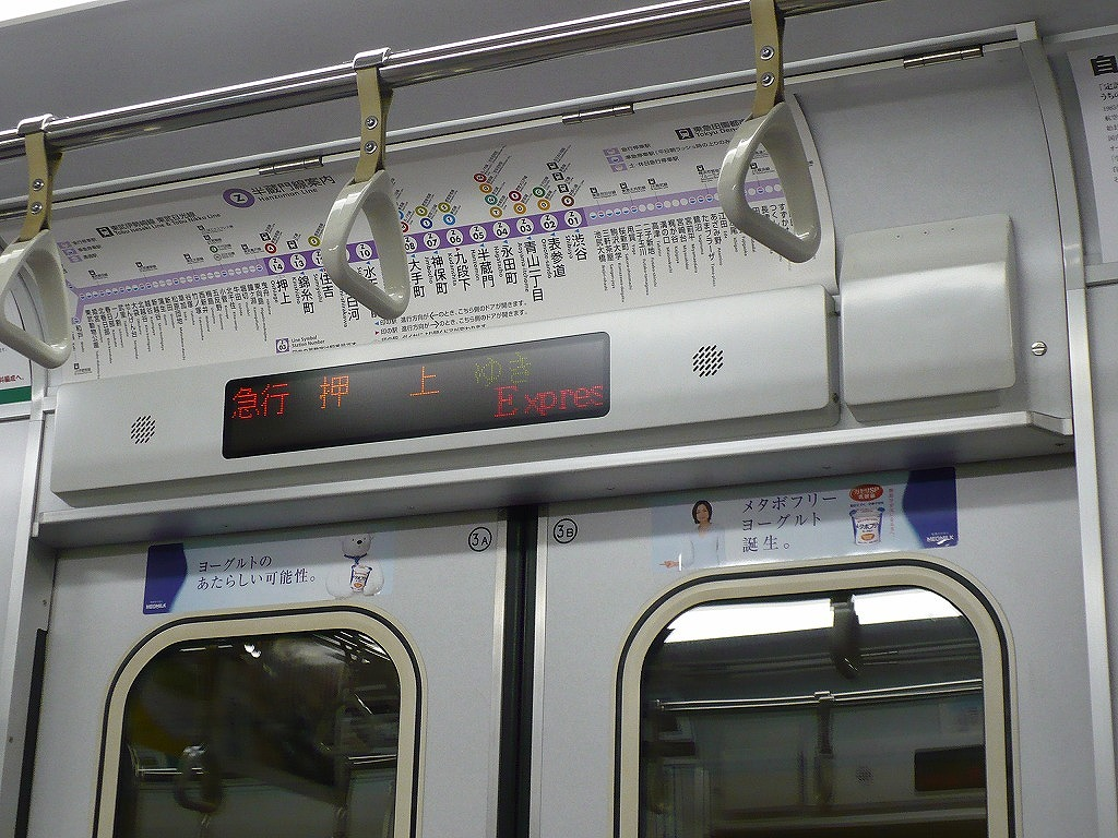 地下鉄08系車内